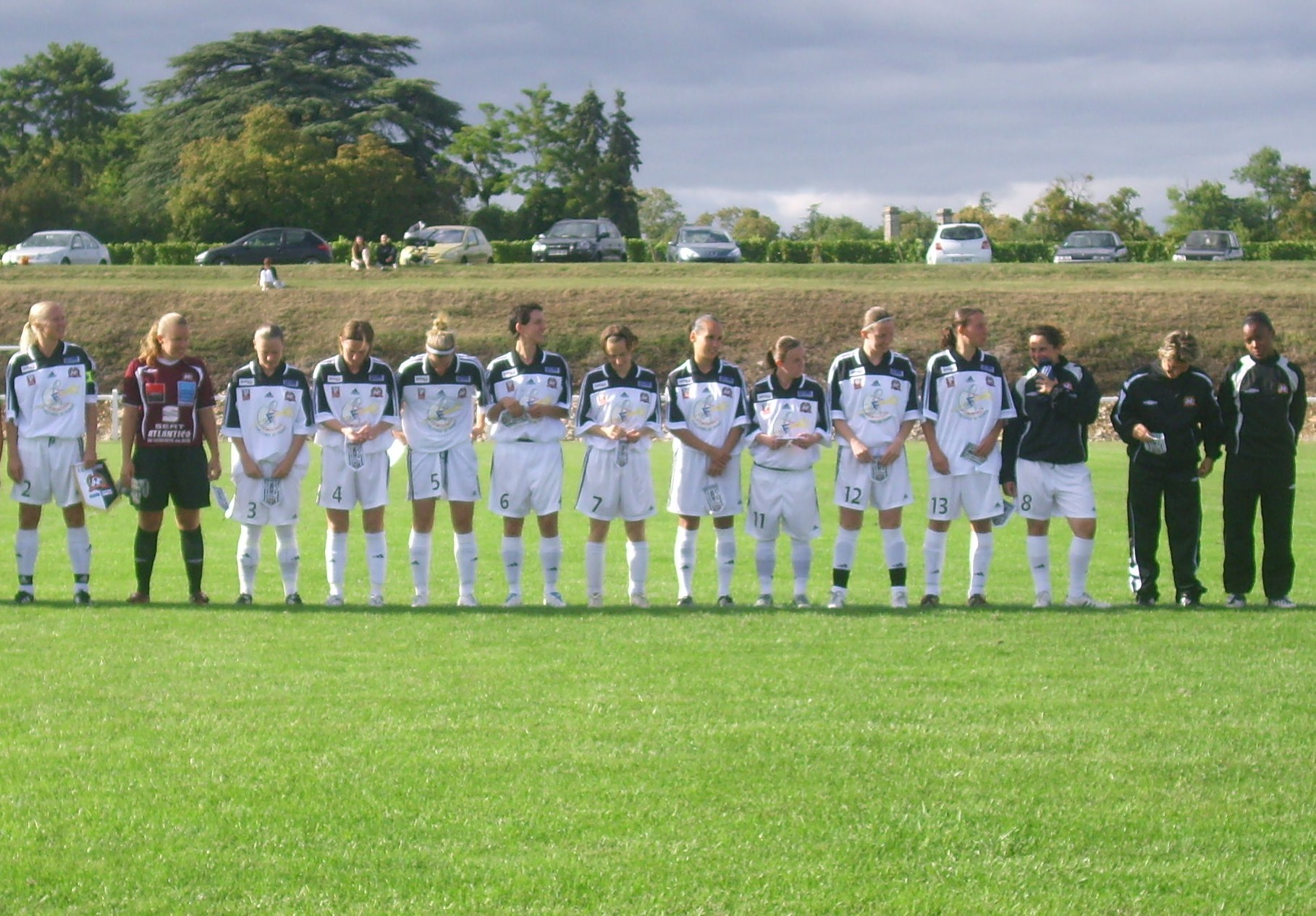 Juvisy contre Nord Allier Yzeure en match amical à Mercurey (71)